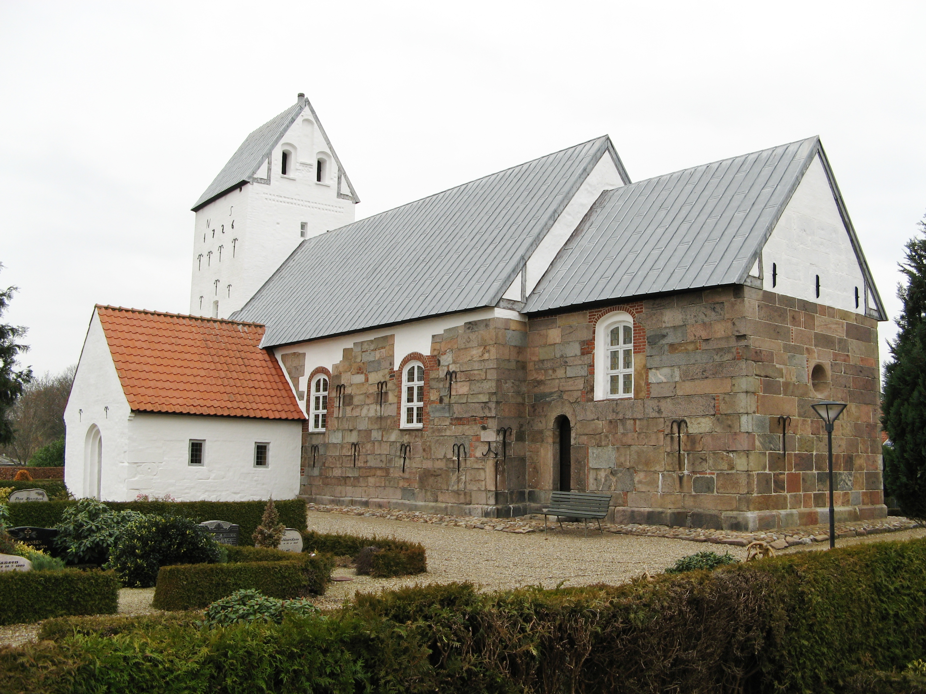 Fåborg kirke, Fåborg sogn, Varde kommune (former: Skads Herred, Ribe Amt). Kirken set fra sydøst